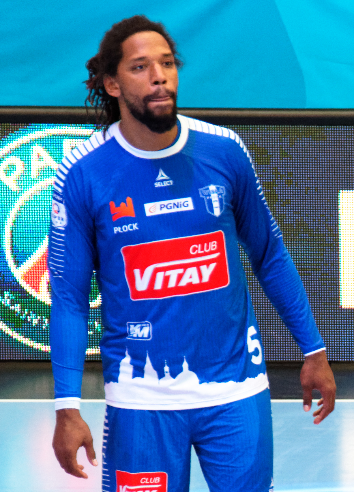 Rencontre de phase de groupe de la Ligue des champions 2016-17. A Coubertin, le 2 octobre 2016.